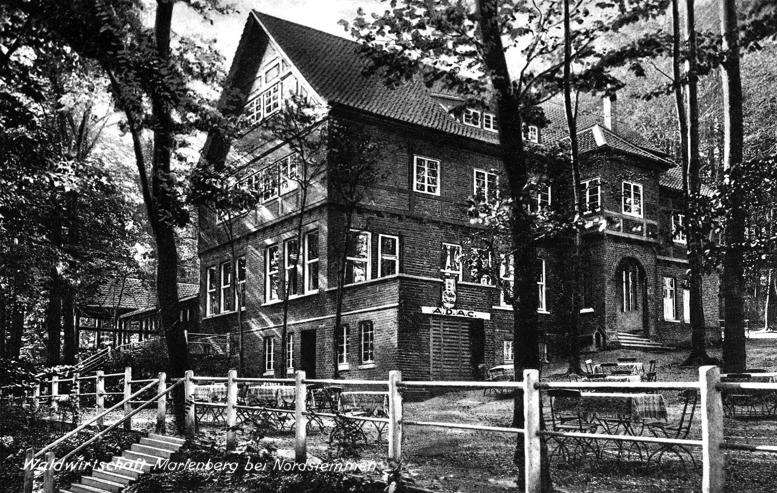 Waldgaststätte Marienberg bei Schloss Marienburg, Region Hannover, Niedersachsen, Deutschland.